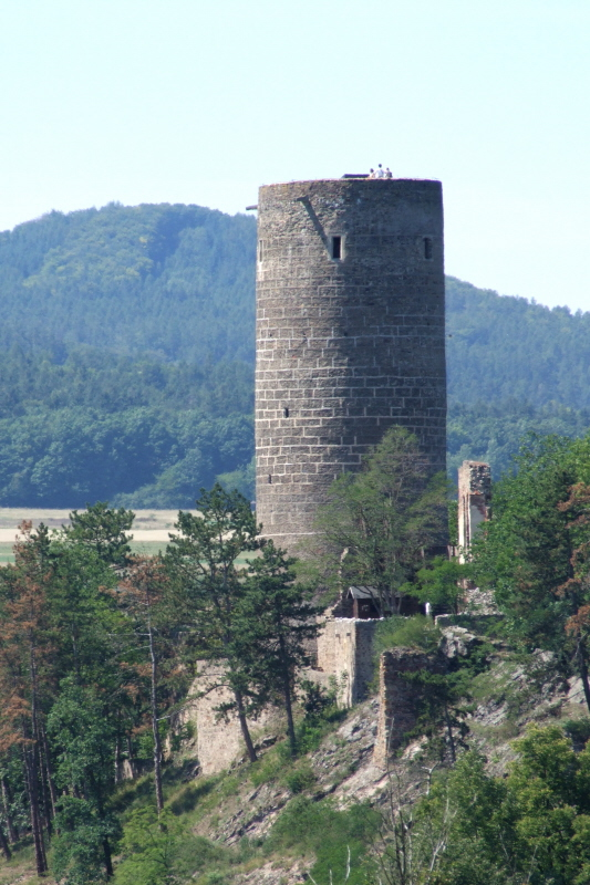 Burg Zebrak